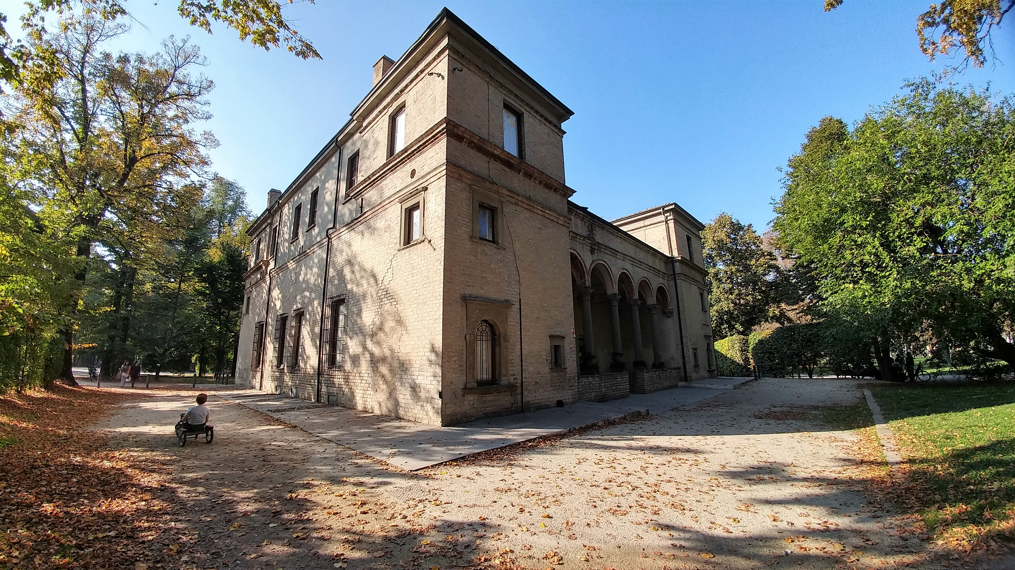 Palazzetto Eucherio Sanvitale This is a photo of a monument which is part of cultural heritage of Italy.